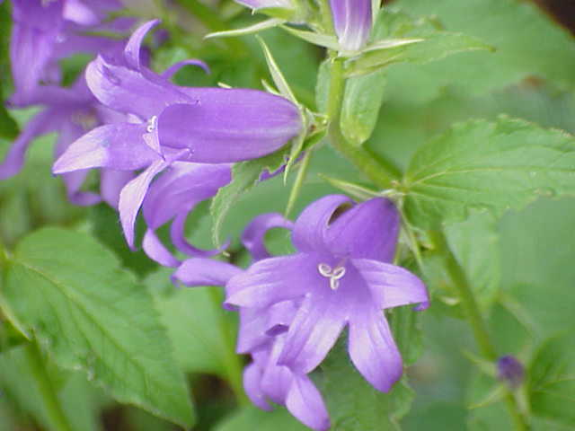 Species: Campanula latifolia Family: Campanulaceae